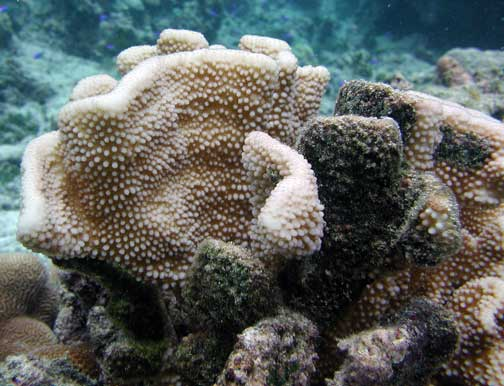 Montipora capitata en Samoa